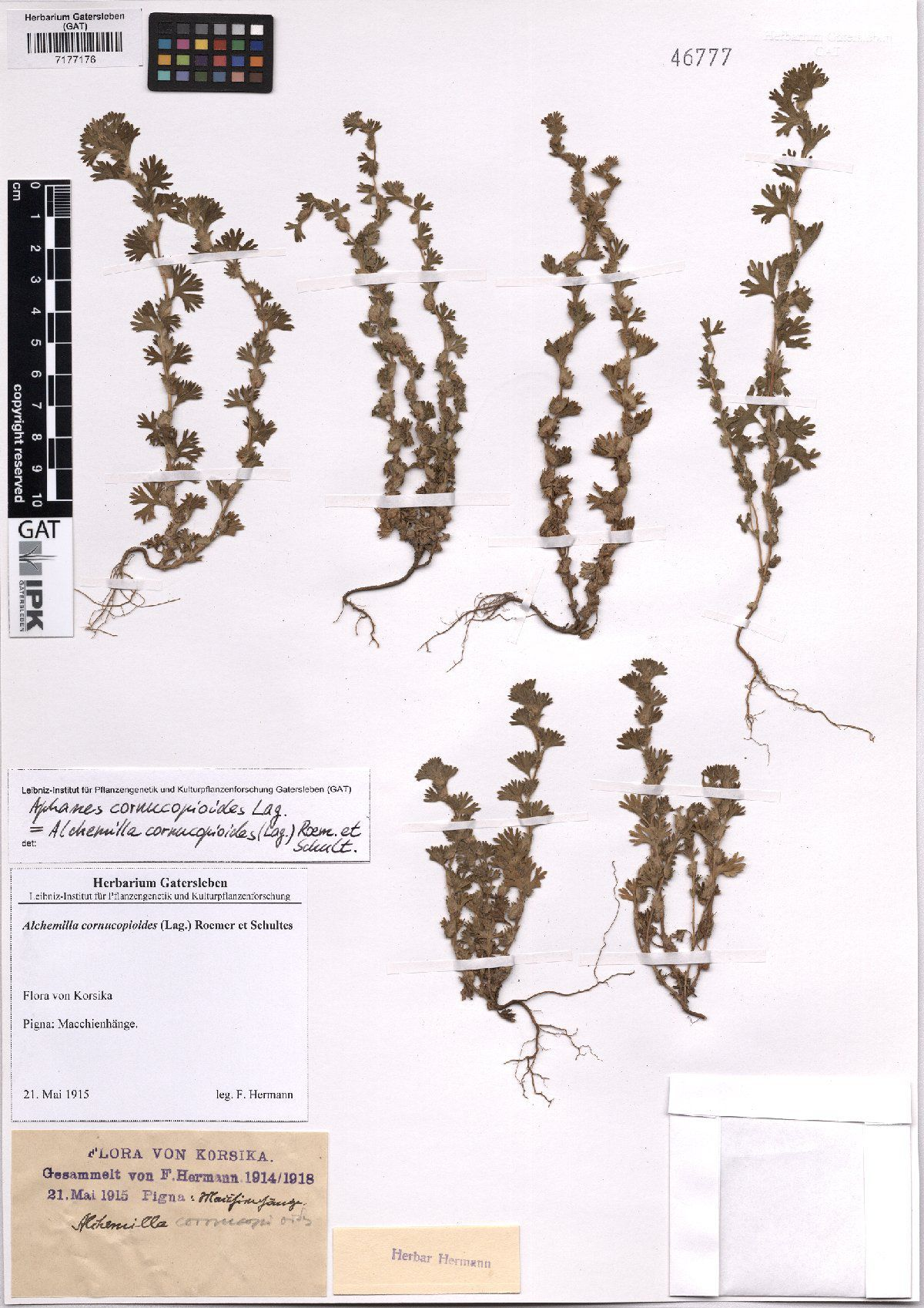 Ejemplar de herbario de Aphanes cornucopioides. Herbarium GAT Leibniz Institute of Plant Genetics and Crop Plant Research (IPK)